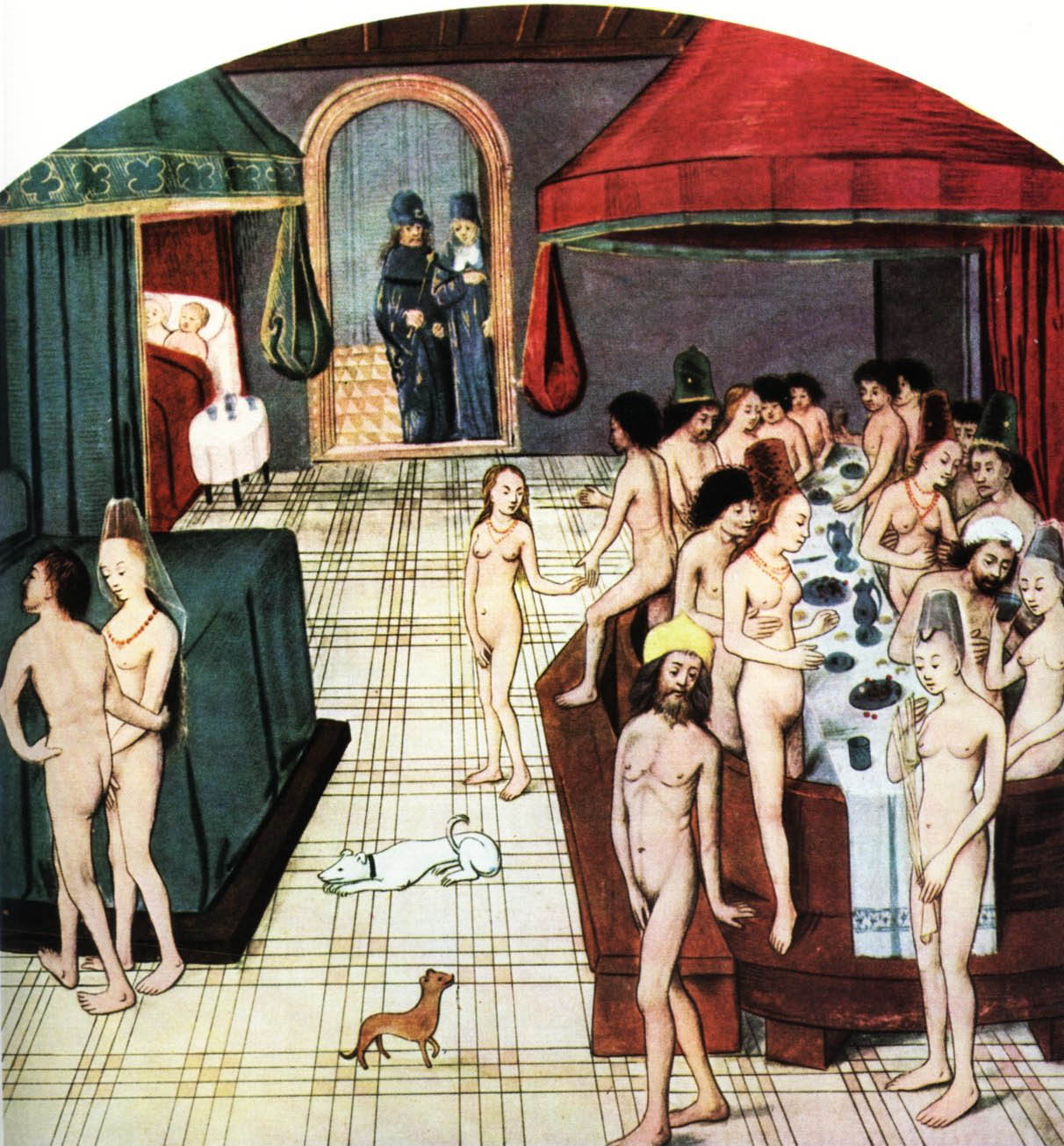 Escena en una casa de baños, miniatura anónima del siglo XV.